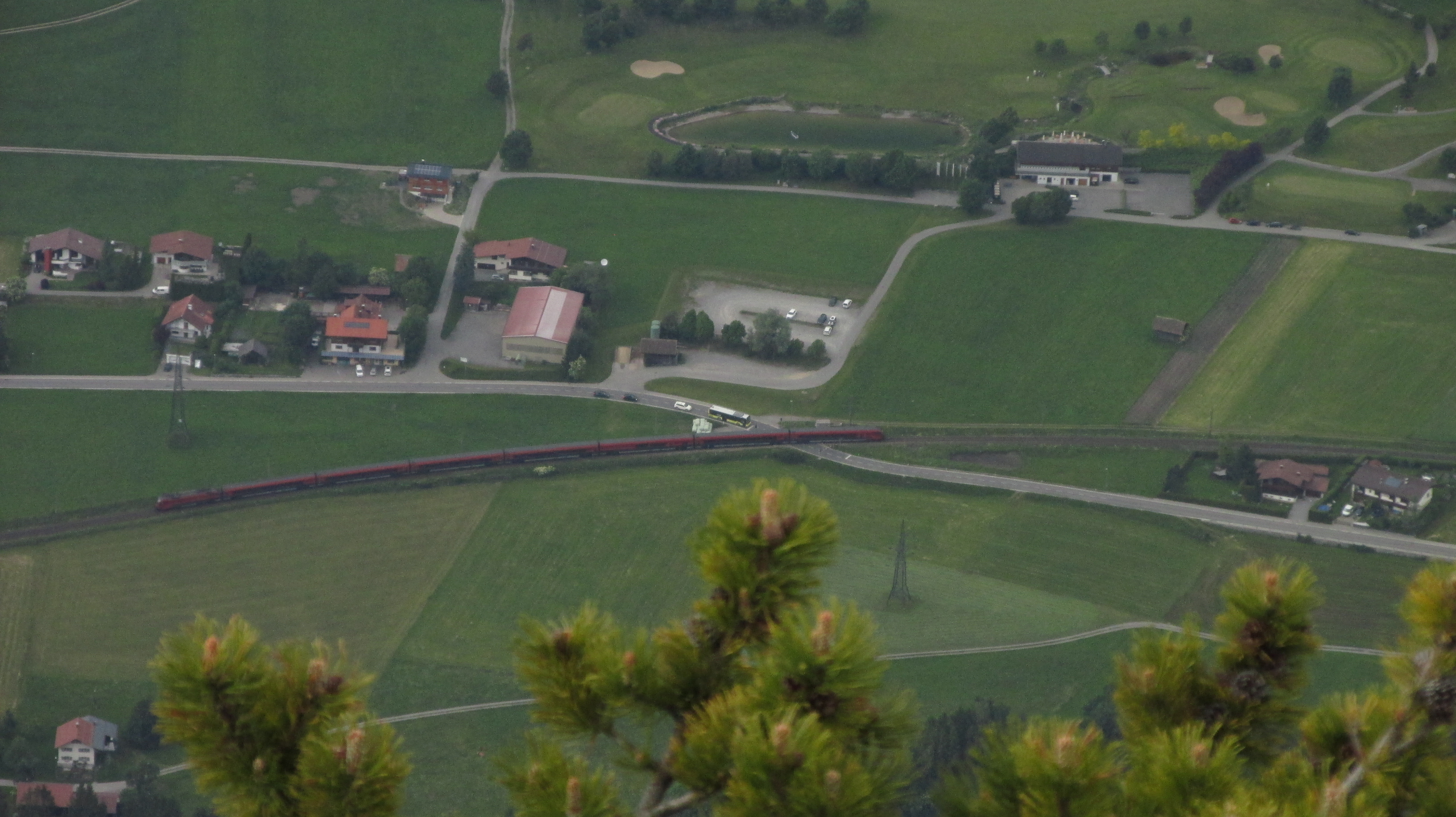 Railjet 862 auf Bahnübergang oberhalb der Parzelle Radin (bei EK 130,502)